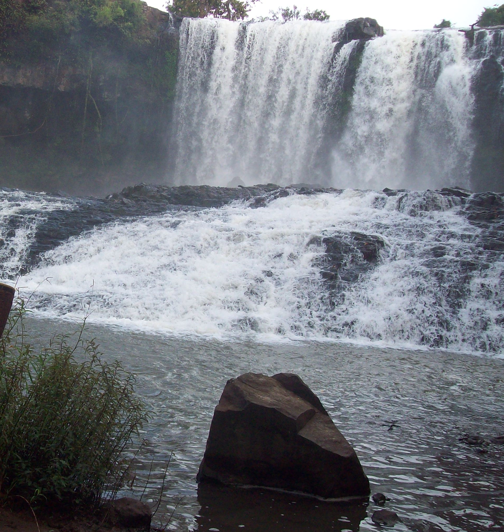 La cascada de Bou Sra, en Mondol Kirí, Camboya